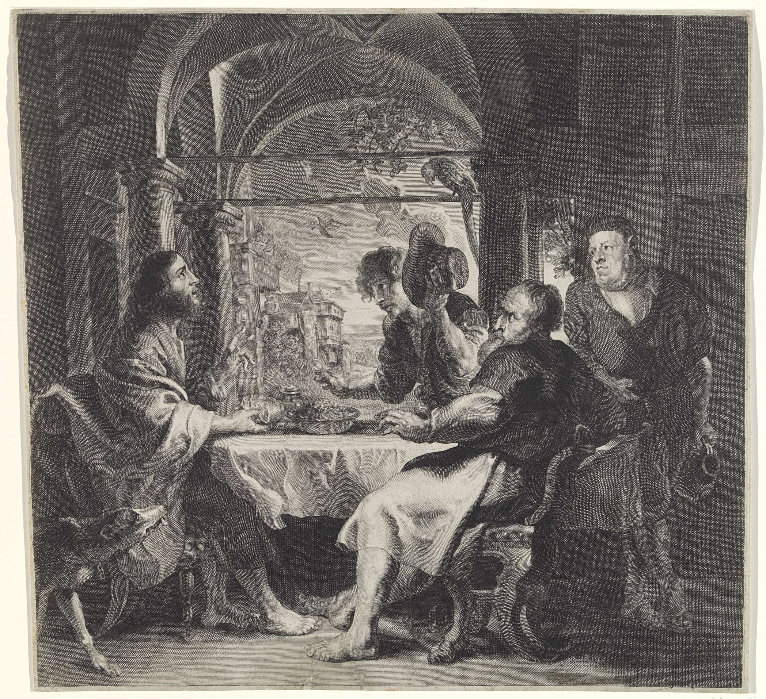 Christus en twee apostelen zitten rond een tafel in een herberg. Christus breekt het brood en maakt zo zijn identiteit bekend. De apostelen reageren geschokt. Boven de tafel een papegaai. Op de achtergrond een landschap en een vleermuis die door de lucht vliegt.; Iconclasscode: 73E343; Iconclasscode: 25F35(PARROT); Iconclasscode: 25F28(BAT); print